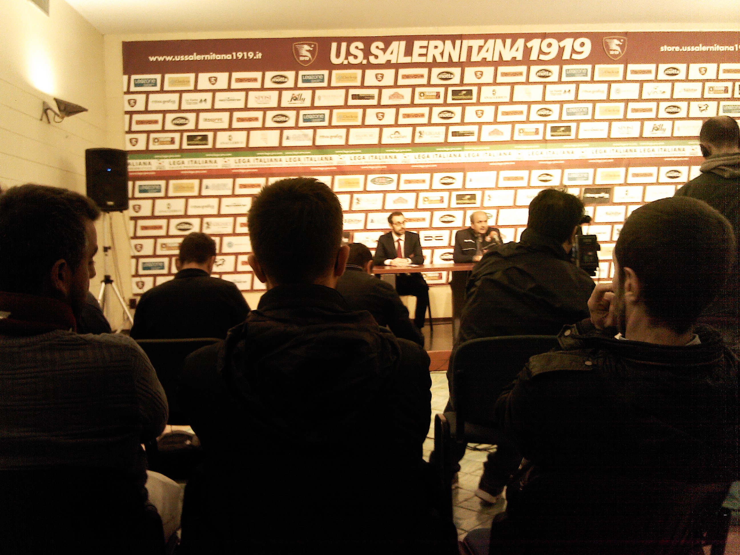 Conferenza di Fabiani dentro l'Arechi dopo la sfida vinta col Teramo (ultima gara della stagione 2014-15 valevole per la Supercoppa di Lega Pro)